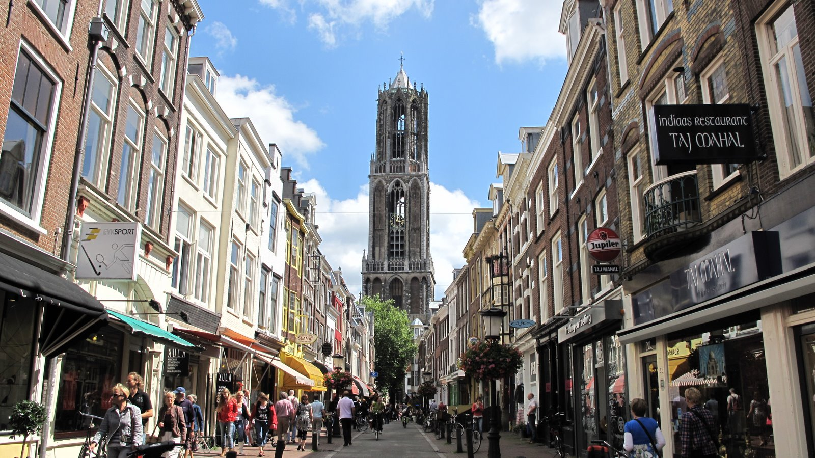 Zadelstraat, Utrecht, Netherlands